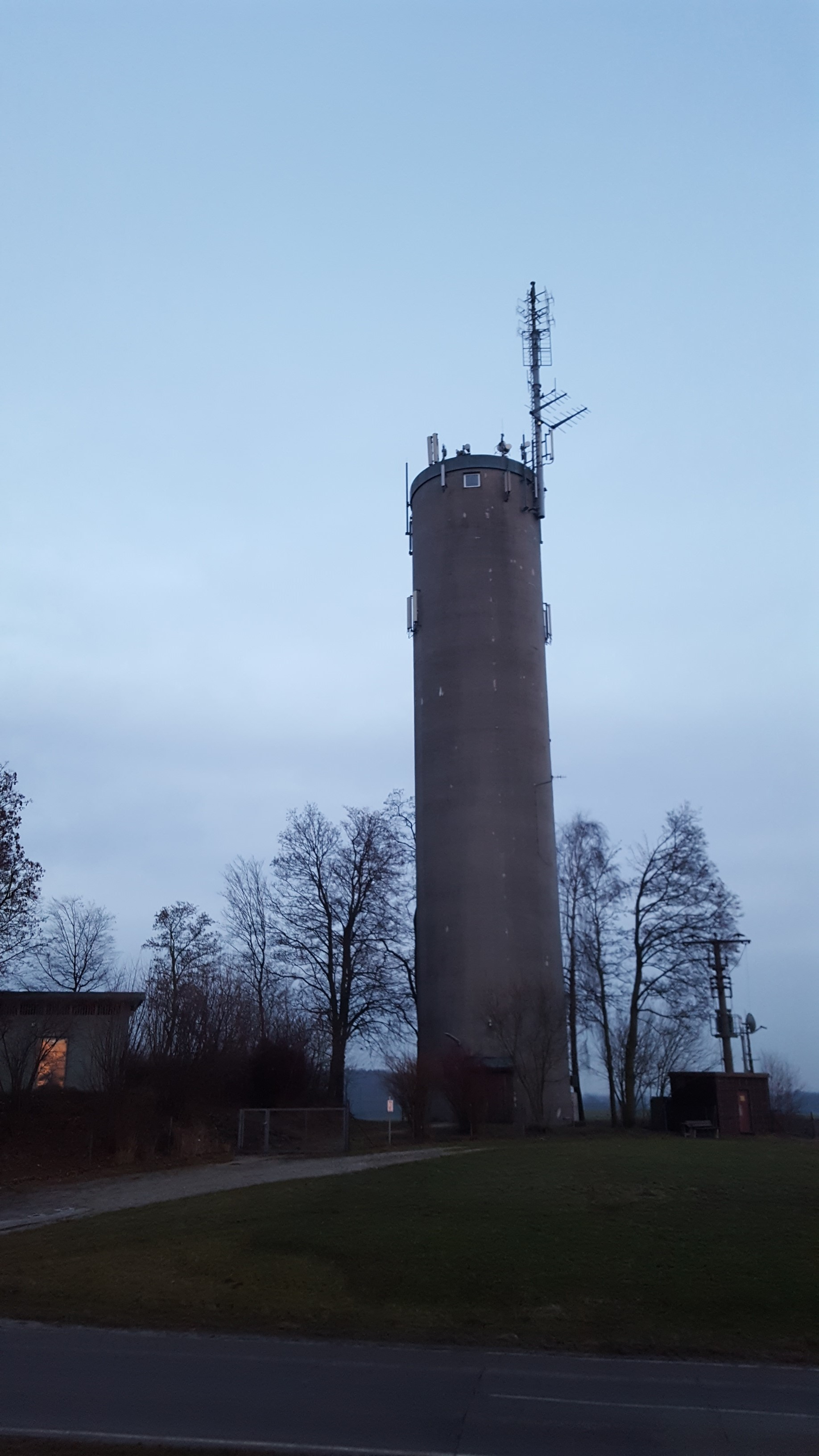 Der Wasserturm von Haberskirch (Friedberg Bay.)